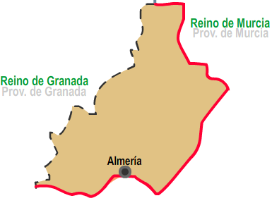 TERRITORIOS Fregenal - Pérdida Grazalema - Incroporación Nuevas Poblaciones de Andalucía y Sierra Morena Reino de Sevilla Reino anterior a 1833 Prov. de Málaga Provincia nueva de 1833